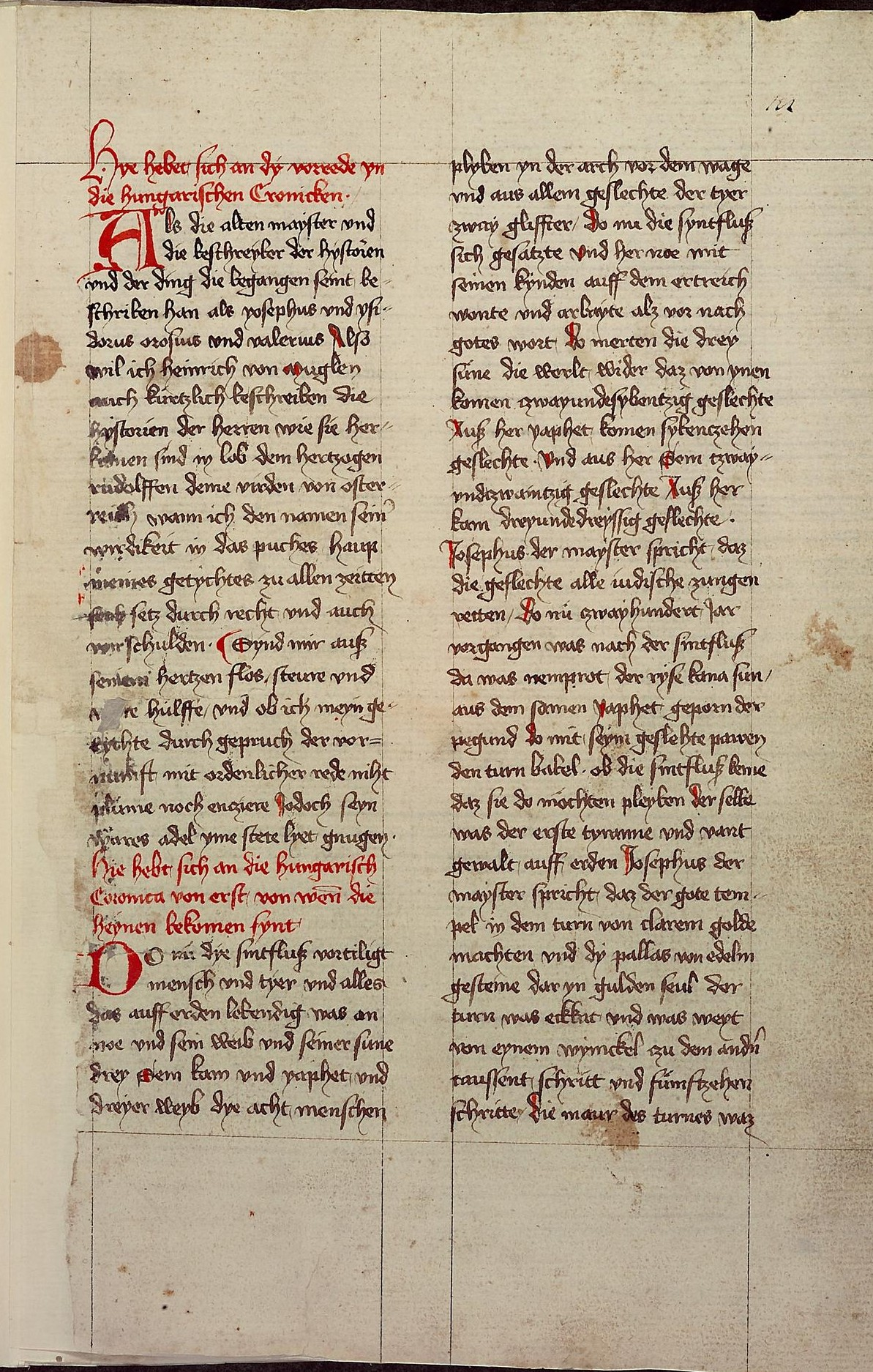 Codex Palatinus germanicus 5, Blatt 18r der Handschrift: Heinrich von Mügeln, "Ungarnchronik" (Anfang)